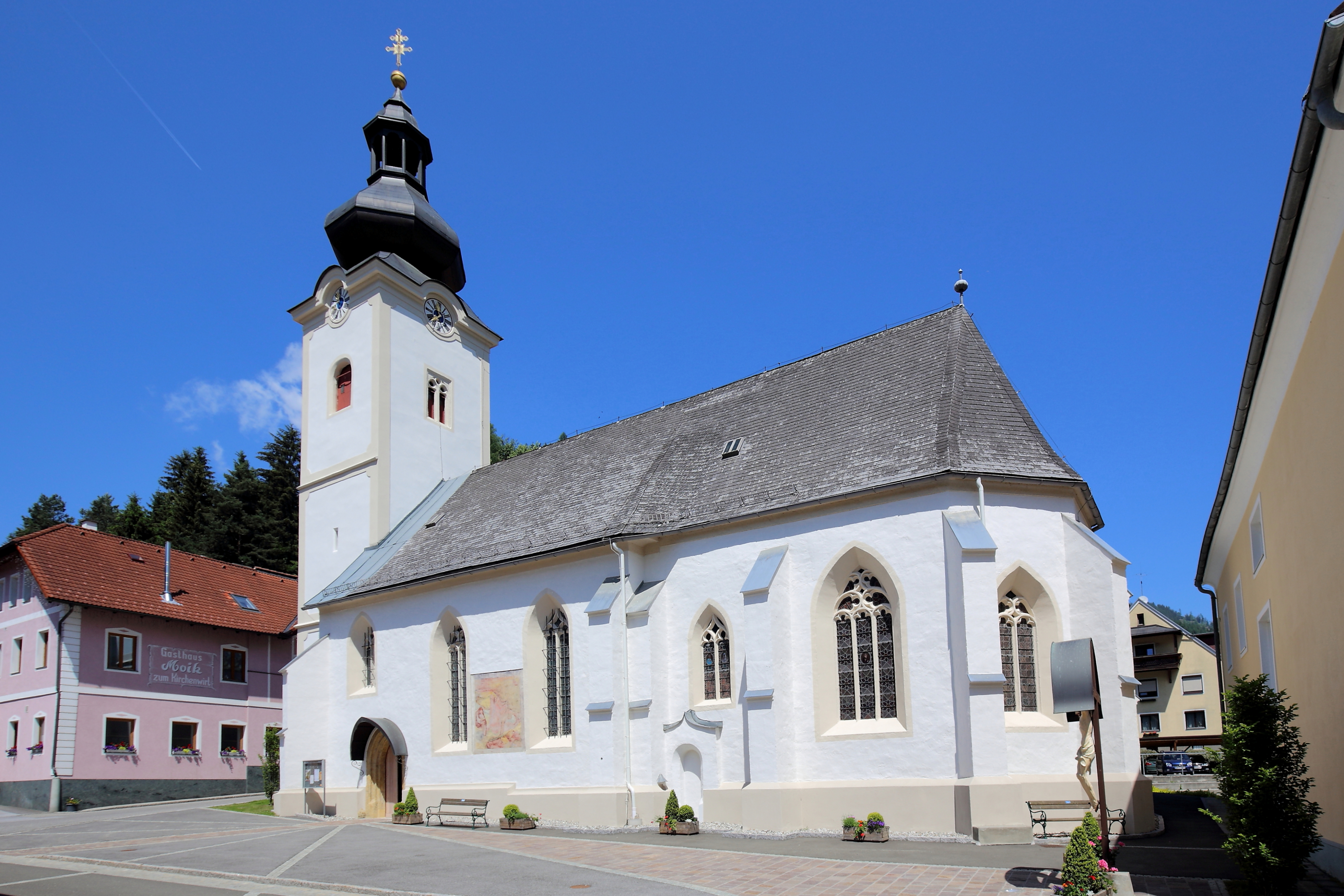 Südostansicht der Pfarrkirche hl. Katharina in Sankt Katharein an der Laming, ein Ortsteil der österreichischen Gemeinde Tragöß-Sankt Katharein im steirischen Bezirk Bruck-Mürzzuschlag. Ein spätgotischer Sakralbau aus dem Anfang des 16. Jahrhunderts. Das barocke Zwiebeldach des dreigeschossigen Turmes wurde 1931 erneuert.